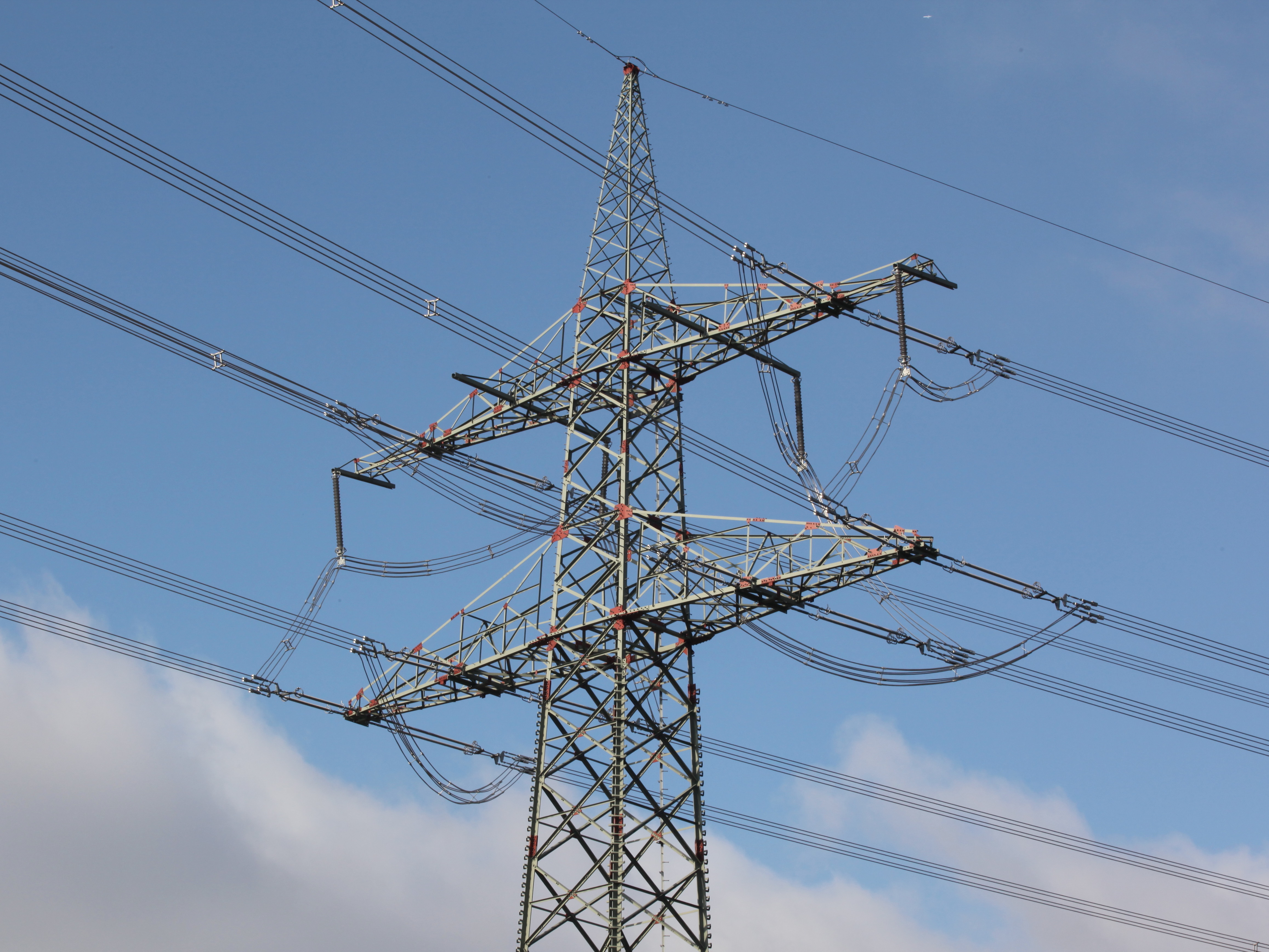 Mast der Thüringer Strombrücke (380 kV) bei Weißenbrunn vorm Wald (Rödental, Bayern), Verdrillmast